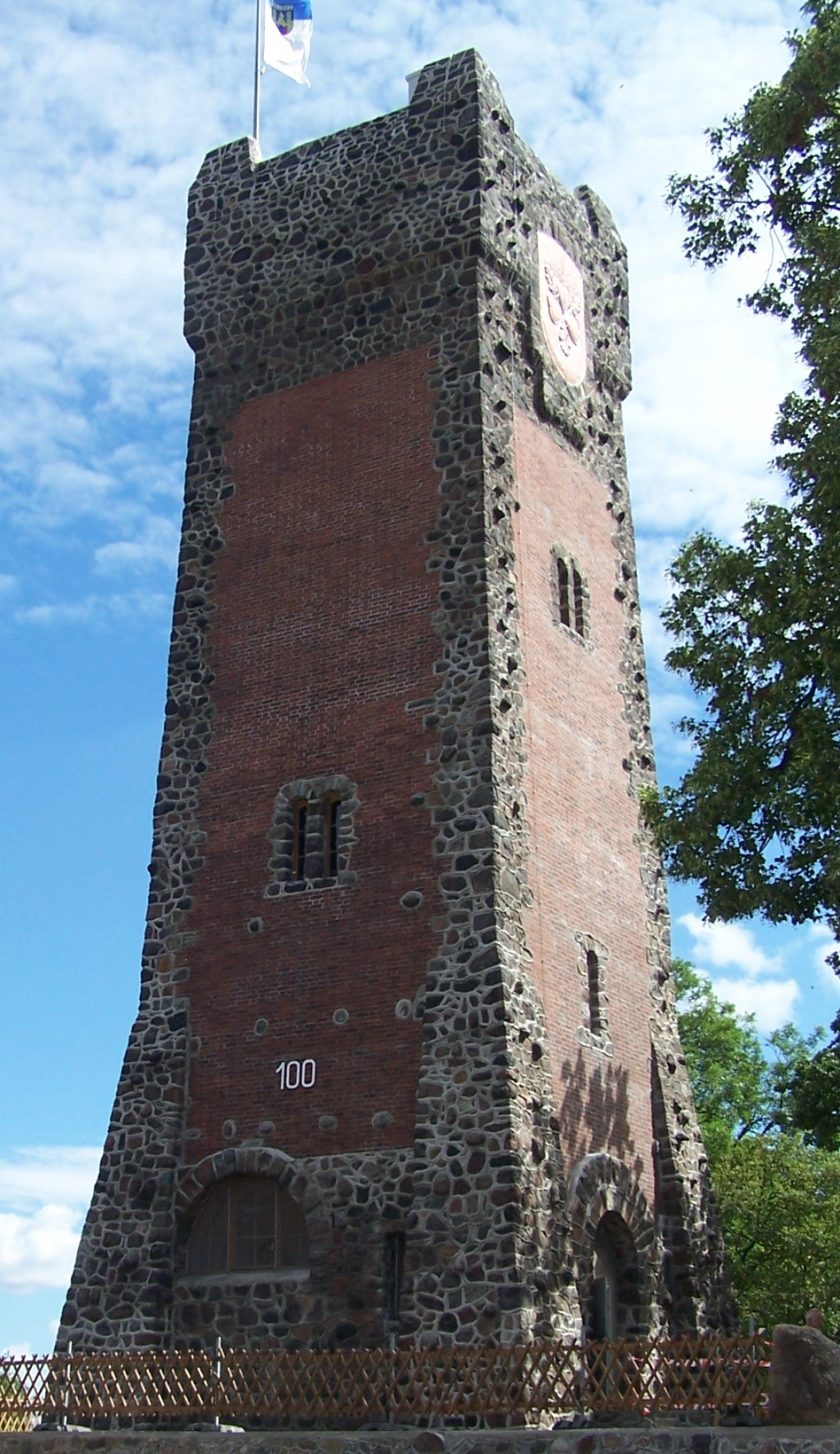 Bismarckturm in Burg (bei Magdeburg) im 100. Jahr seines Bestehens